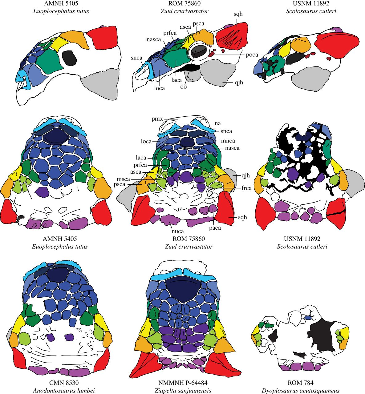 Cranial ornamentation of ankylosaurins compared, in dorsal and lateral views. Abbreviations are as follows: asca, anterior supraorbital caputegulum; frca, frontal caputegulum; laca, lacrimal caputegulum; loca, loreal caputegulum; mnca, median nasal caputegulum; msca, middle supraorbital caputegulum; na, external naris; nasca, nasal caputegulae; nuca, nuchal caputegulum; oo, ocular osteoderm; paca, parietal caputegulum; pmx, premaxilla; pnca, postnarial caputegulum; poca, postocular caputegulum; prfca, prefrontal caputegulum; psca, posterior supraorbital caputegulum; qjh, quadratojugal horn; snca, supranarial caputegulum; sqh, squamosal horn. Skulls are scaled to the same anteroposterior length.